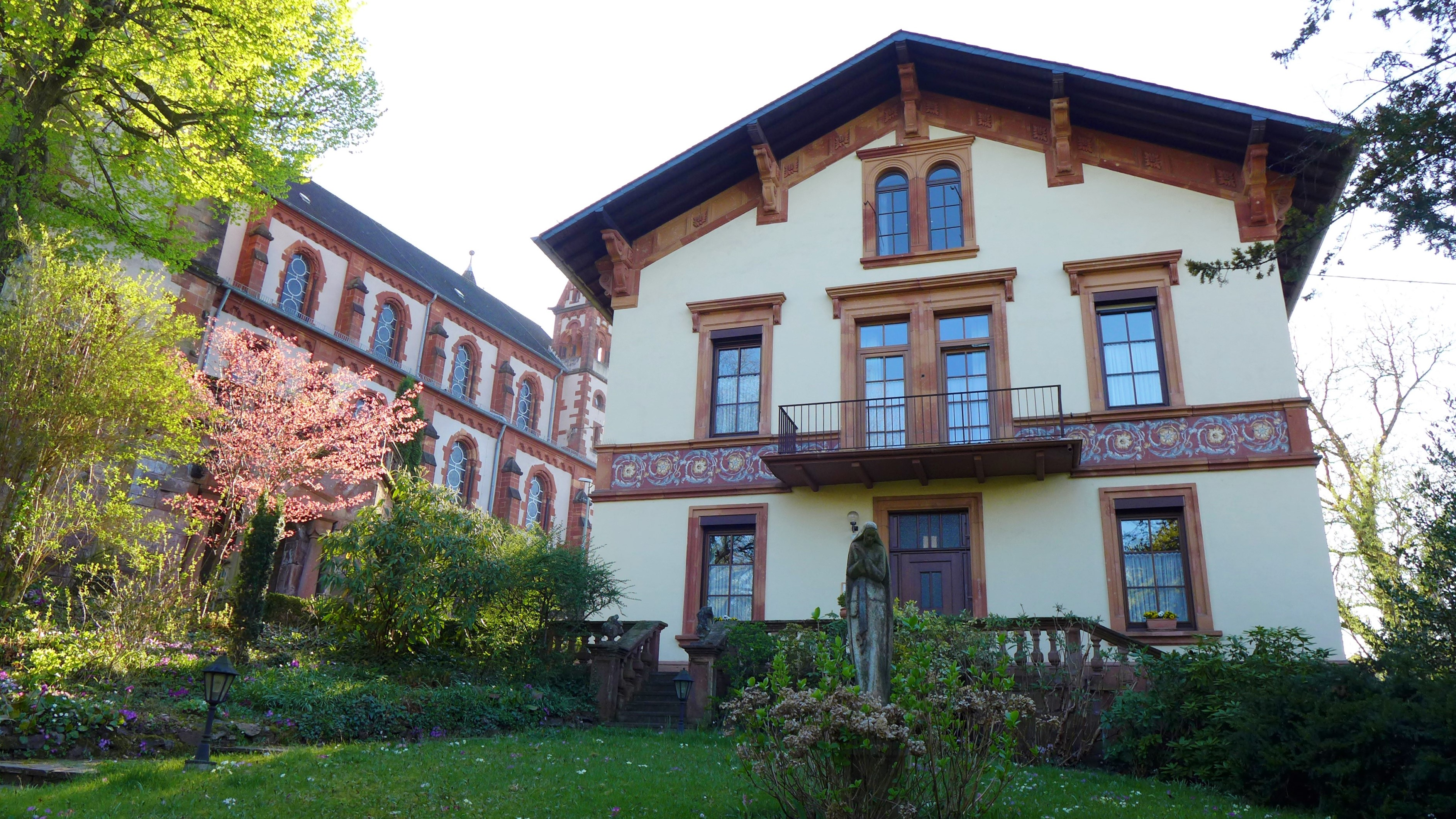 St. Luitwin (Mettlach), Pfarrhaus